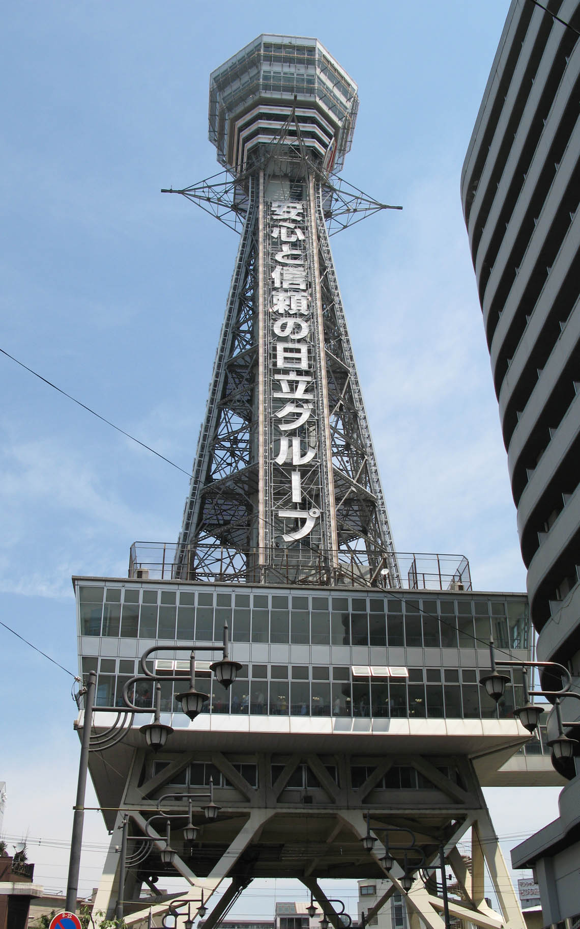 通天閣の写真（南側から撮影） 2007年4月撮影。 機材：PowerShot G7 撮影者：Kansai explorer 撮影後トリミング・リサイズ